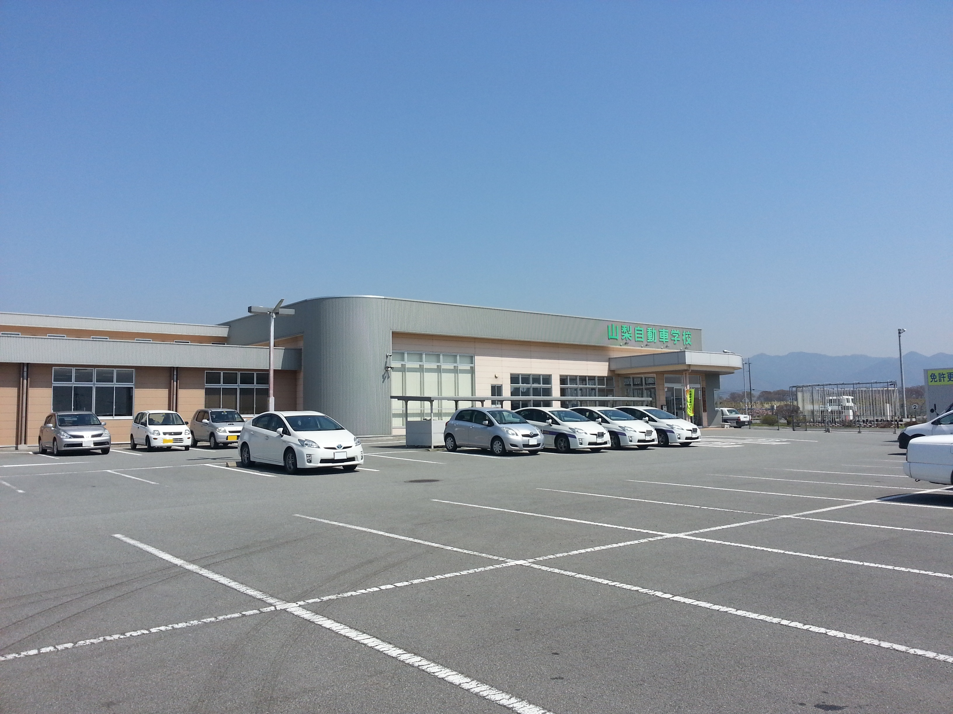 山梨自動車学校の校舎外見＆駐車場です